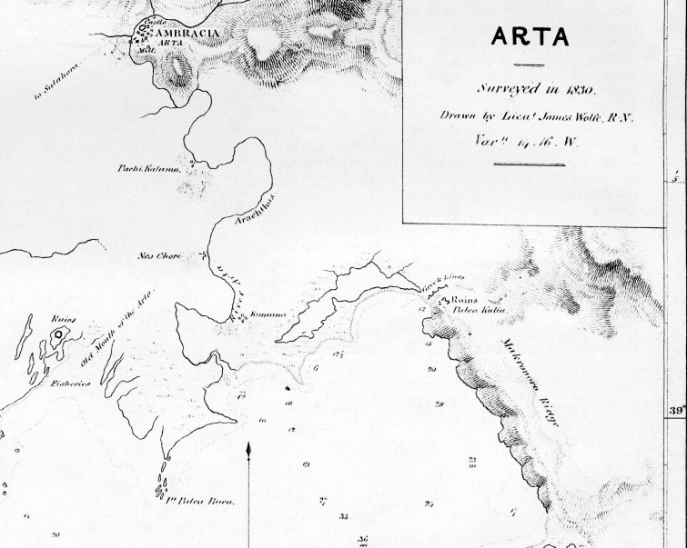 Χάρτης του Τζέημς Γουλφ, 1830. Άραχθος, Άρτα, Αμβρακία, Παλιομπούκα, Παλαιά κοίτη Αράχθου, Νεοχώρι, Κομμένο, Παχυκάλαμος, Παλαιά Κούλια. Ο Άμβρακος αναφέρεται ως "ερείπια", δίπλα στην παλαιά κοίτη του Αράχθου.